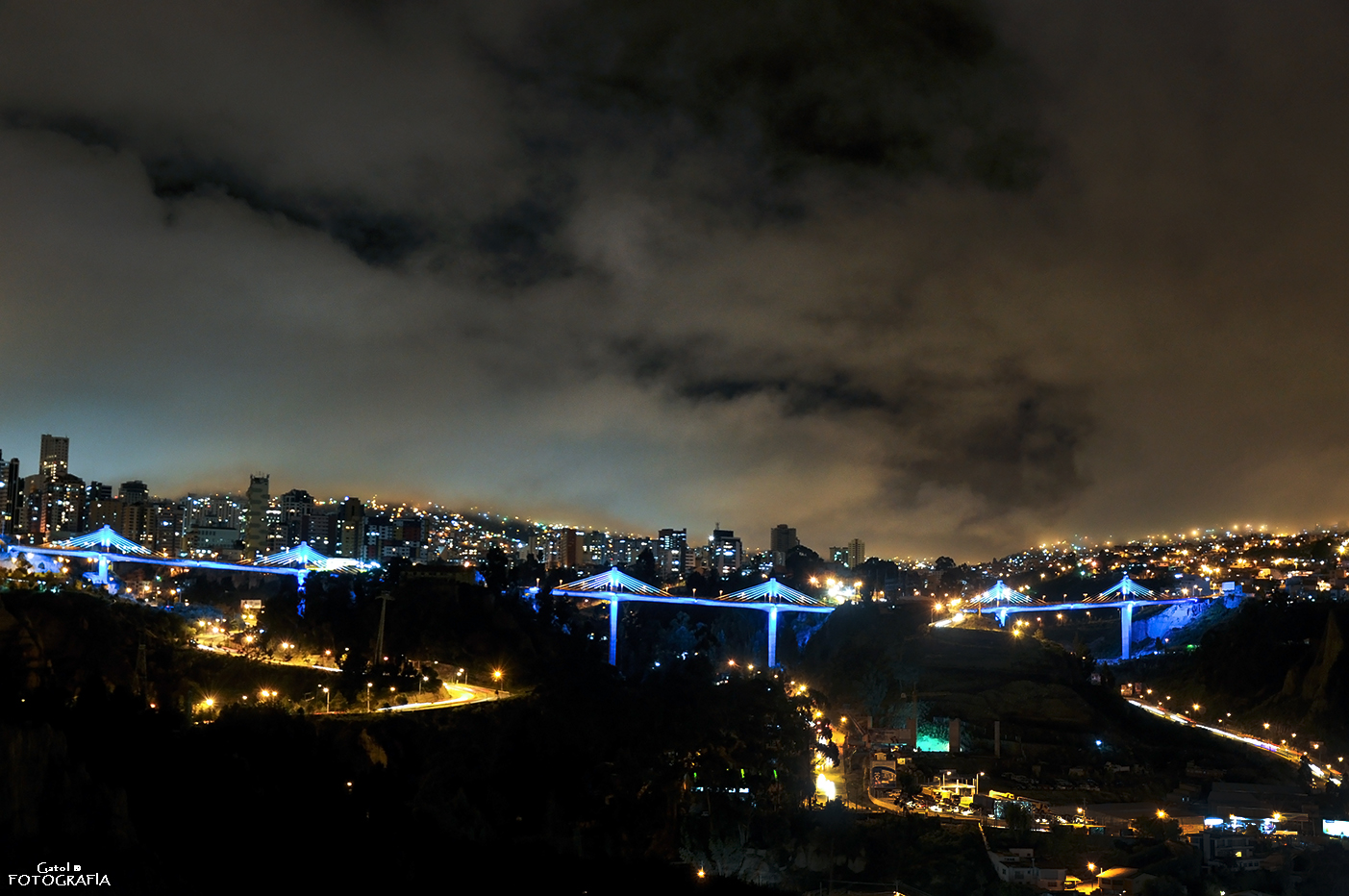 Puentes Trillizos